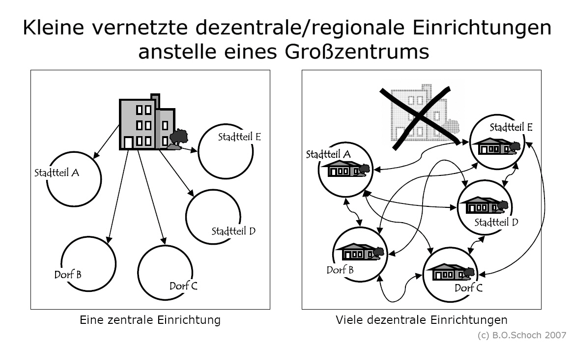 Strukturmaxime Dezentralisierung/Regionalisierung aus dem Konzept Lebensweltorientierung / Lebensweltorientierte Soziale Arbeit; Hans Thiersch